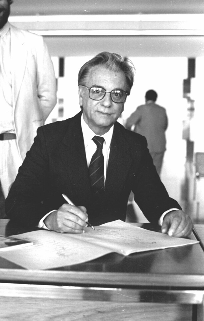 Local - Salão Negro Do Senado Federal Data - 29/09/1988 Assunto - Assinatura da Constitutição Participantes - Sen Itamar Franco Env-287 Neg - 31 Fotografo - Celio Azevedo